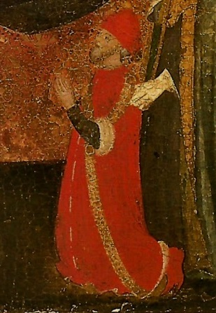 Alfonso Fernández de Montemayor († 1390) en el Políptico de la Virgen de la Leche. Fue señor de Montemayor y de Alcaudete y adelantado mayor de la frontera de Andalucía.